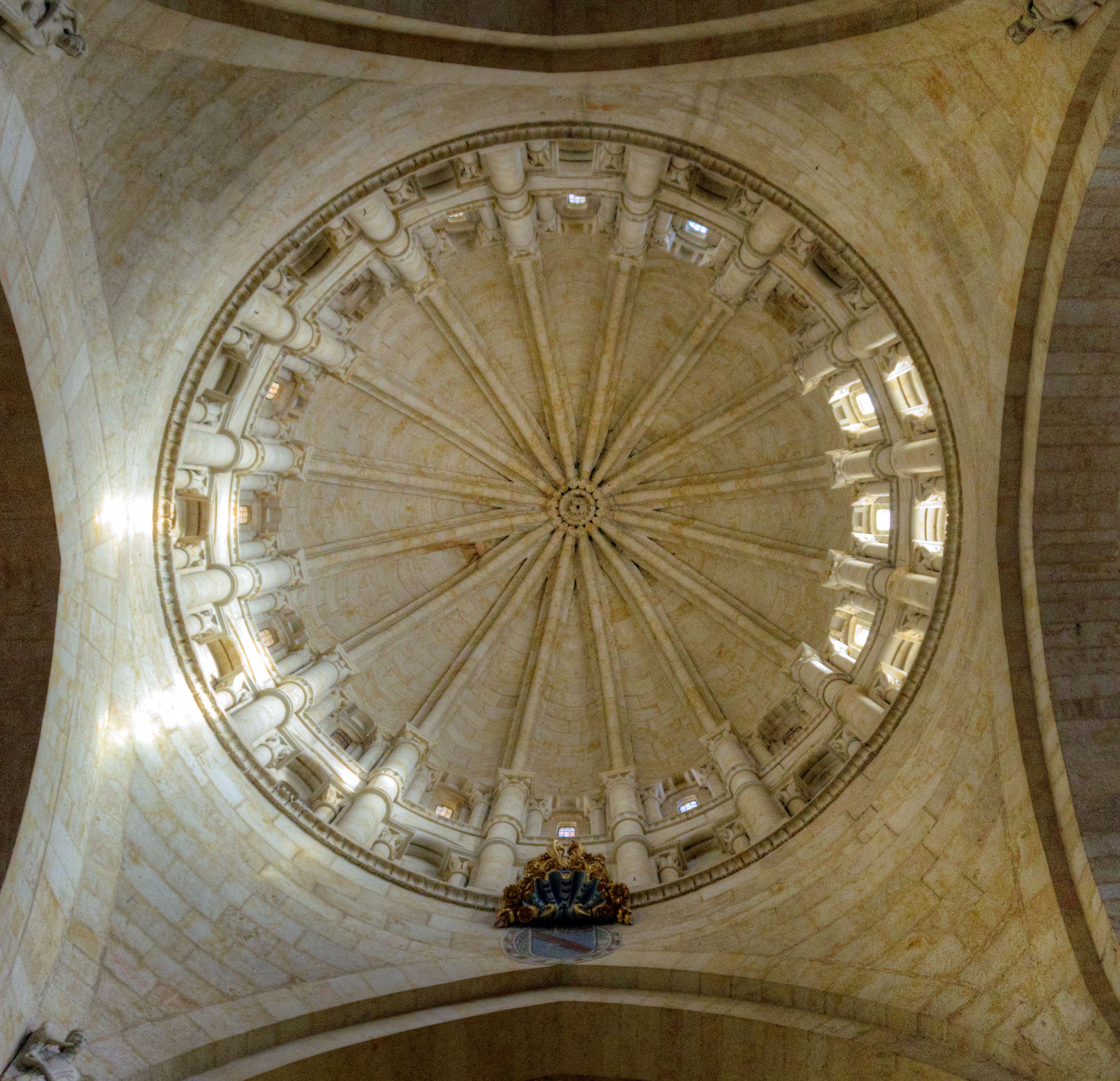 El cimborrio de esta catedral fue construido en el siglo XII. Posee 16 nervios apoyados en columnas y 32 ventanas, dos por cada espacio entre los nervios. Fue desmontada y vuelta a arnar en el siglo